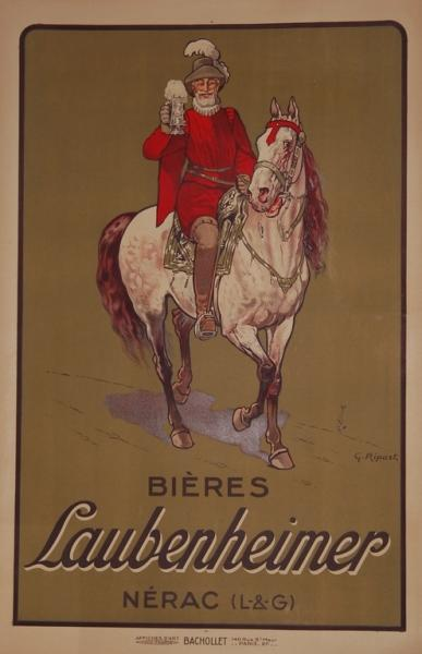 Bières Laubenheimer (Nérac, Lot-et-Garonne, France), affiche lithographiée chez Bachollet (Paris.